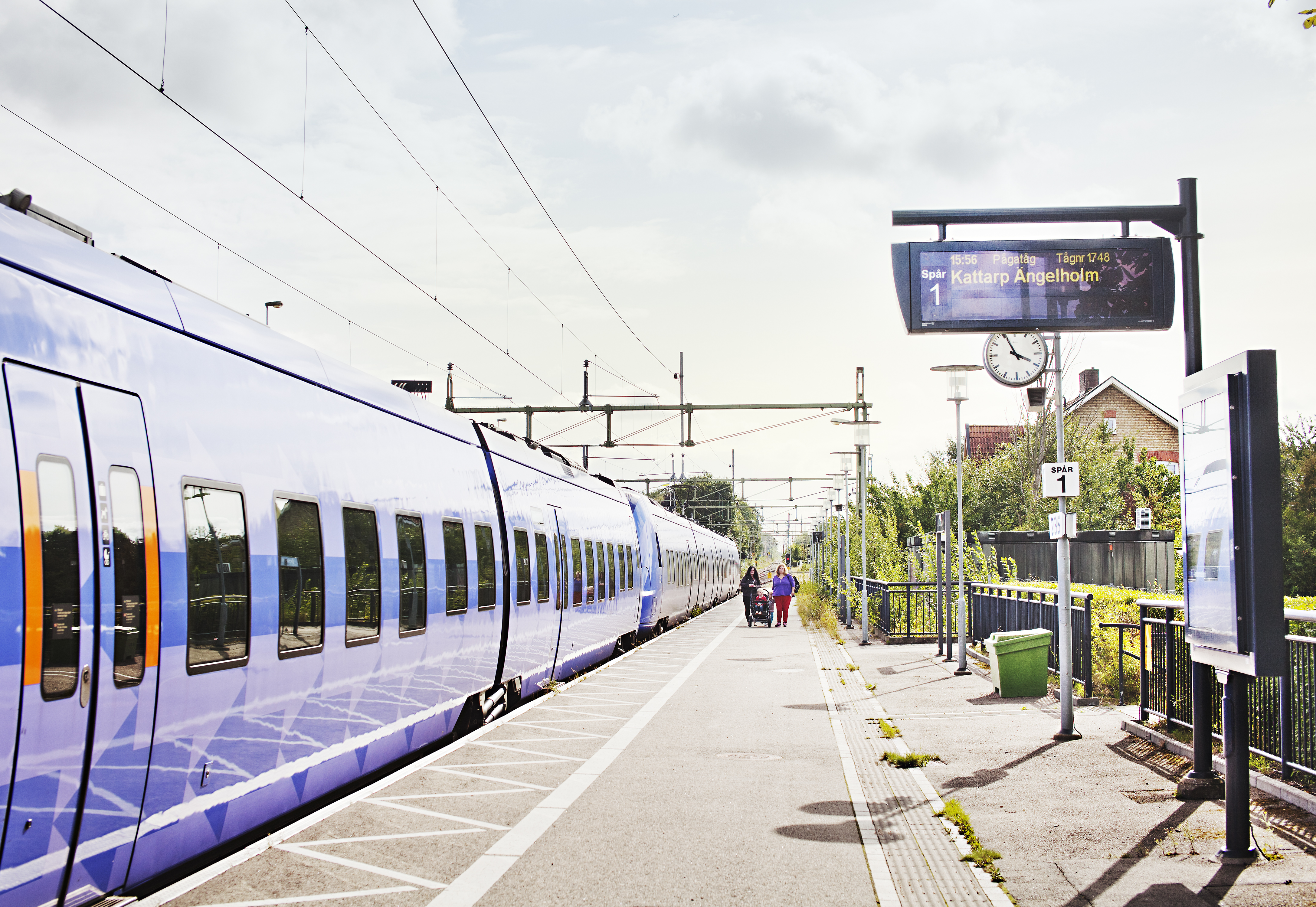 Stationen i Ödåkra.